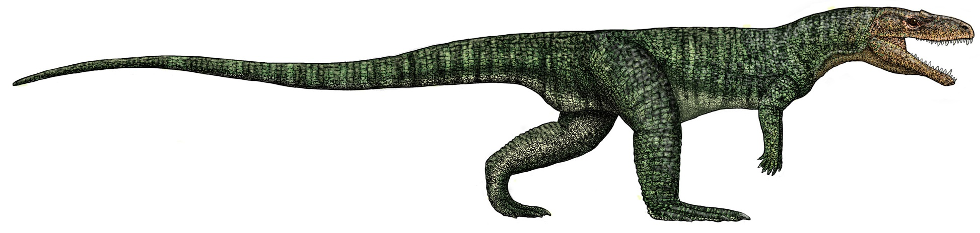 Credit Dr. Jeff Martz/NPS